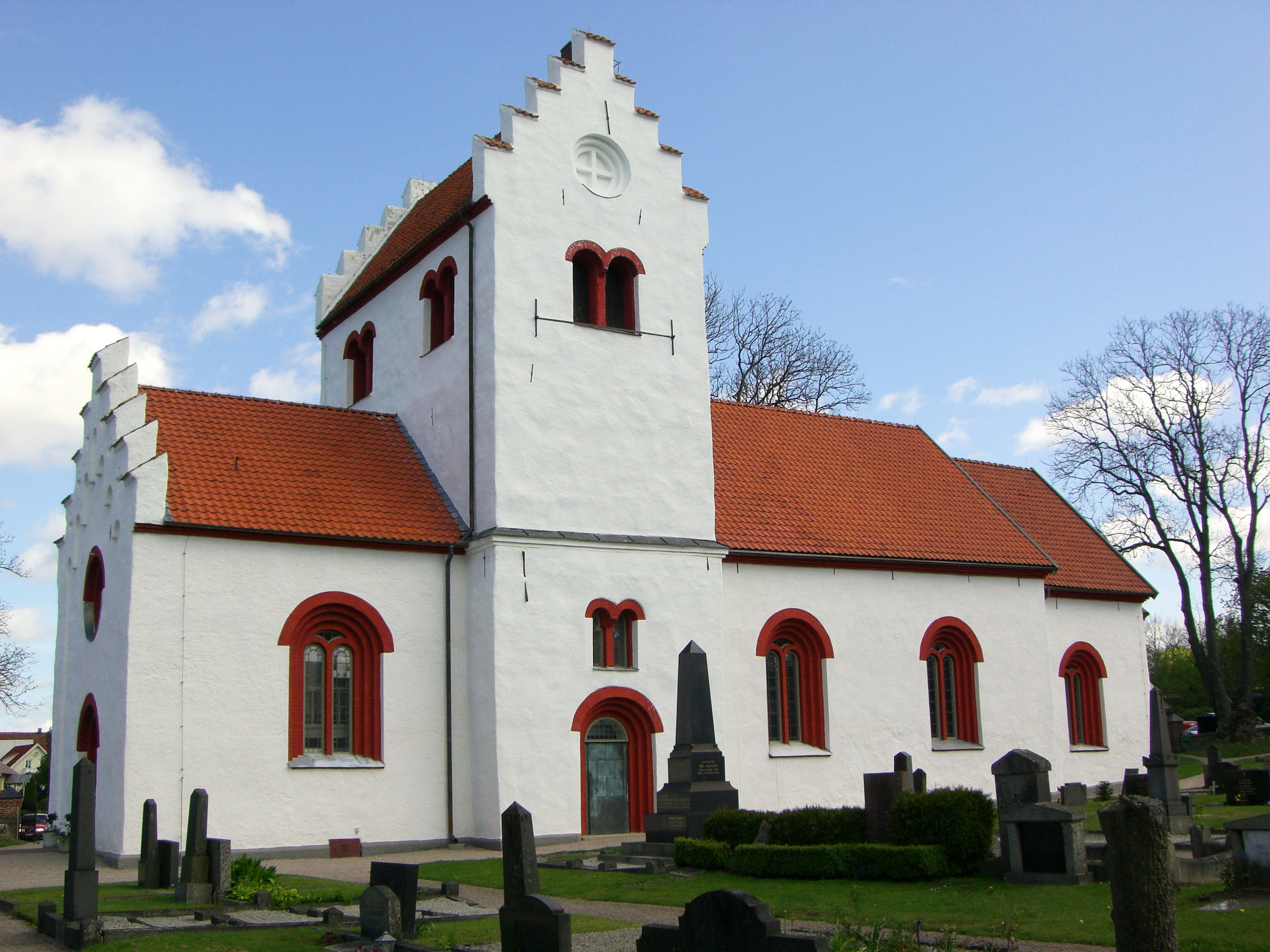 Hästveda kyrka, med rödmålade valvbågar.